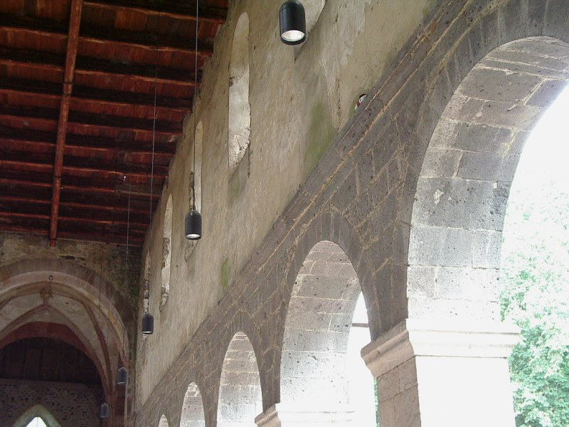 Beschreibung Schiffenberg, ehem. Augustiner-Chorherrenstift, Klosterkirche, Langhaus, südlicher Obergaden (innen), von NW (ca. 2004-05-31). Quelle Fotographie ca. 2004-05-31 Fotograph --Keichwa Copyright Status GNU Freie Dokumentationslizenz Schiffenberg ist ein Stadtteil von Gießen. Kloster, Langhaus - dort weitere Bilder